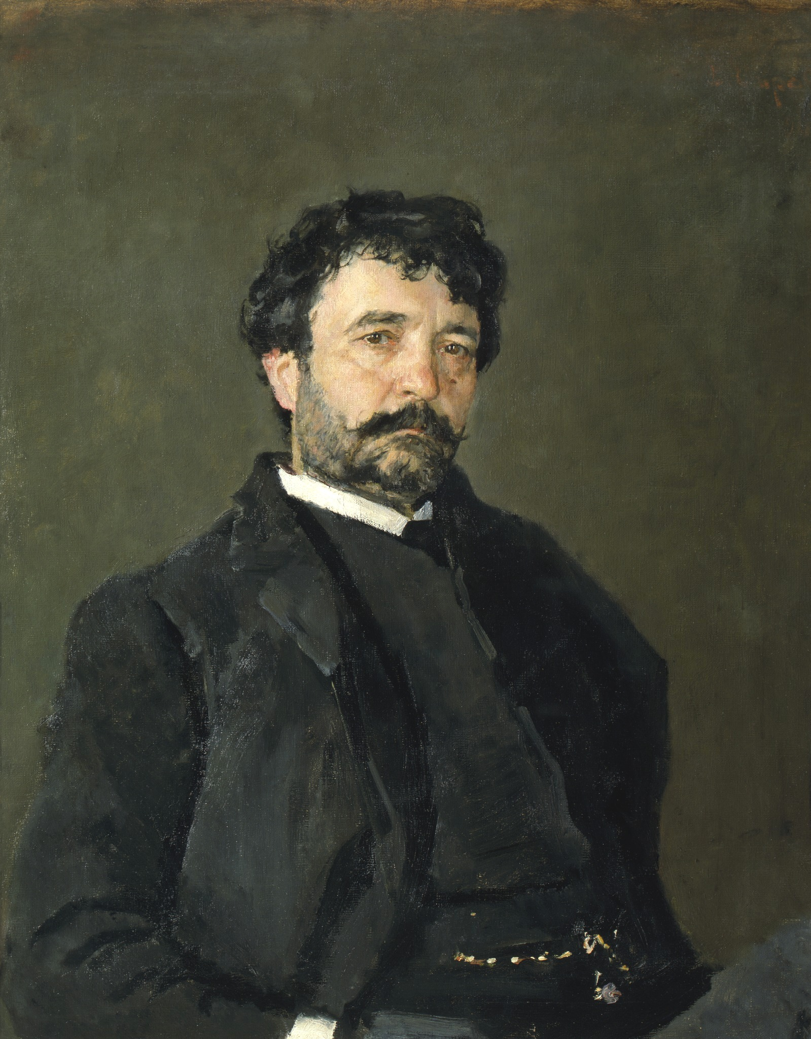 Porträt des italienischen Sängers Angelo Masini